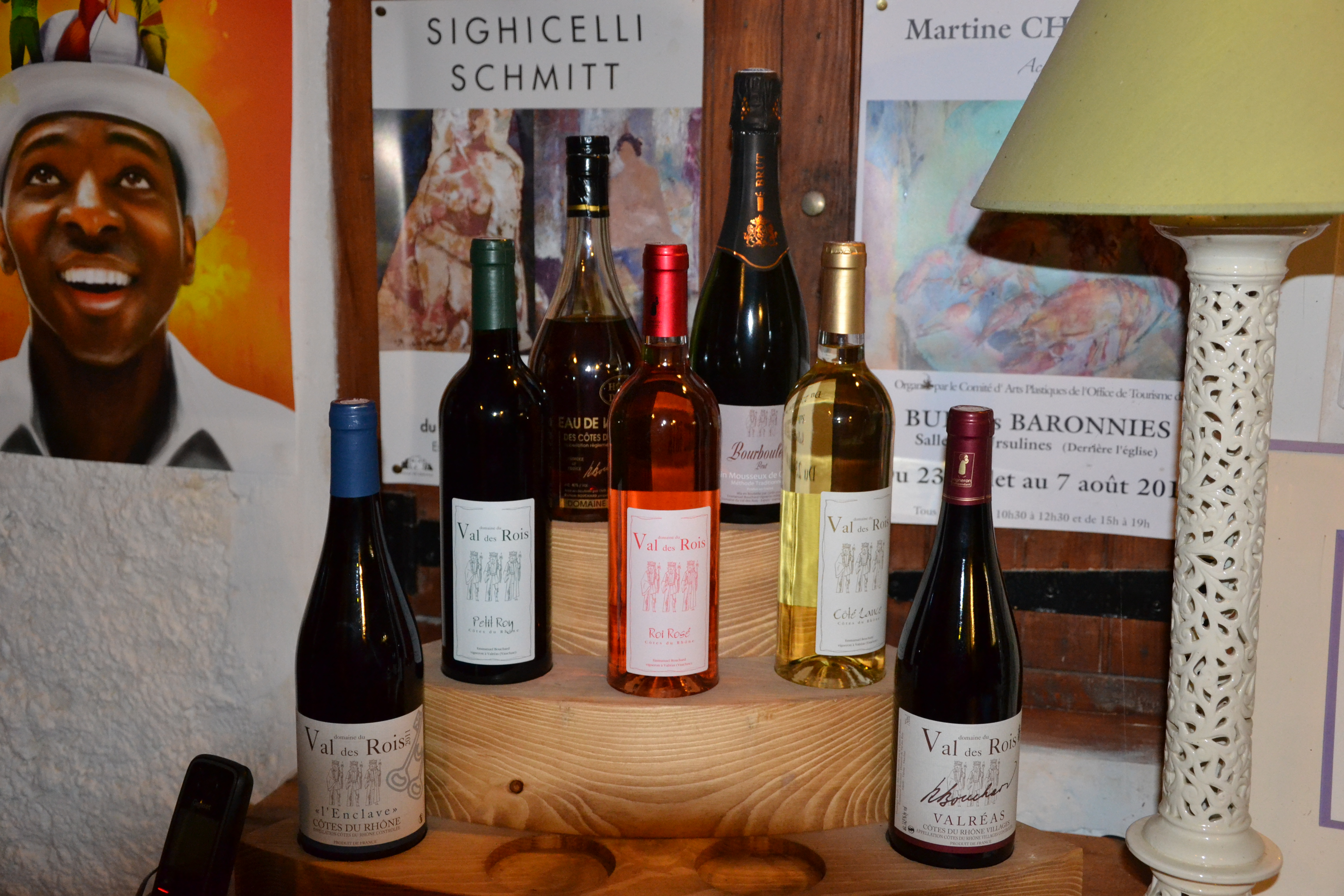 bouteilles du domaine du Val des rois, à Valréas